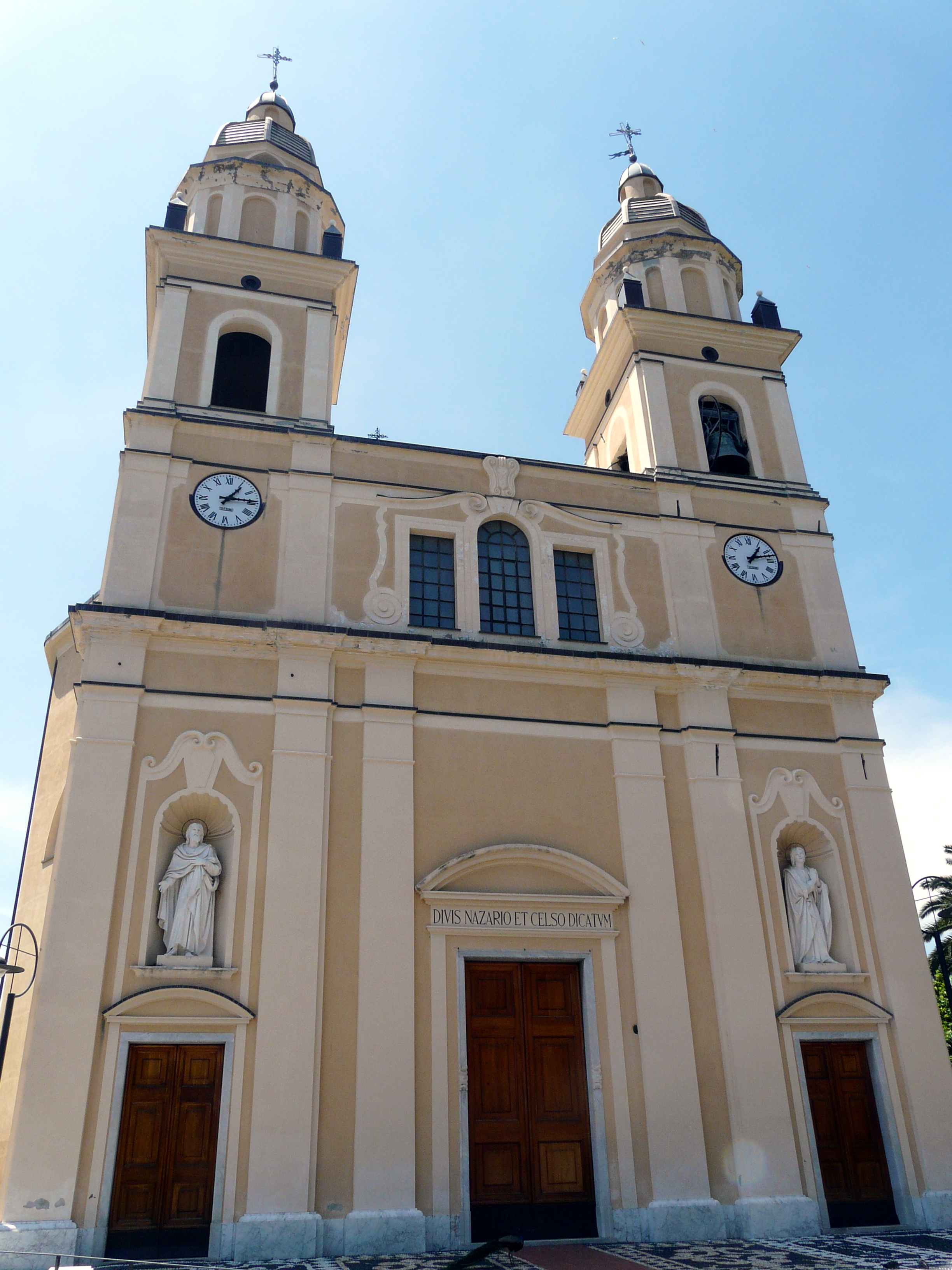 Facciata della chiesa dei Santi Nazario e Celso, Arenzano, Liguria, Italia